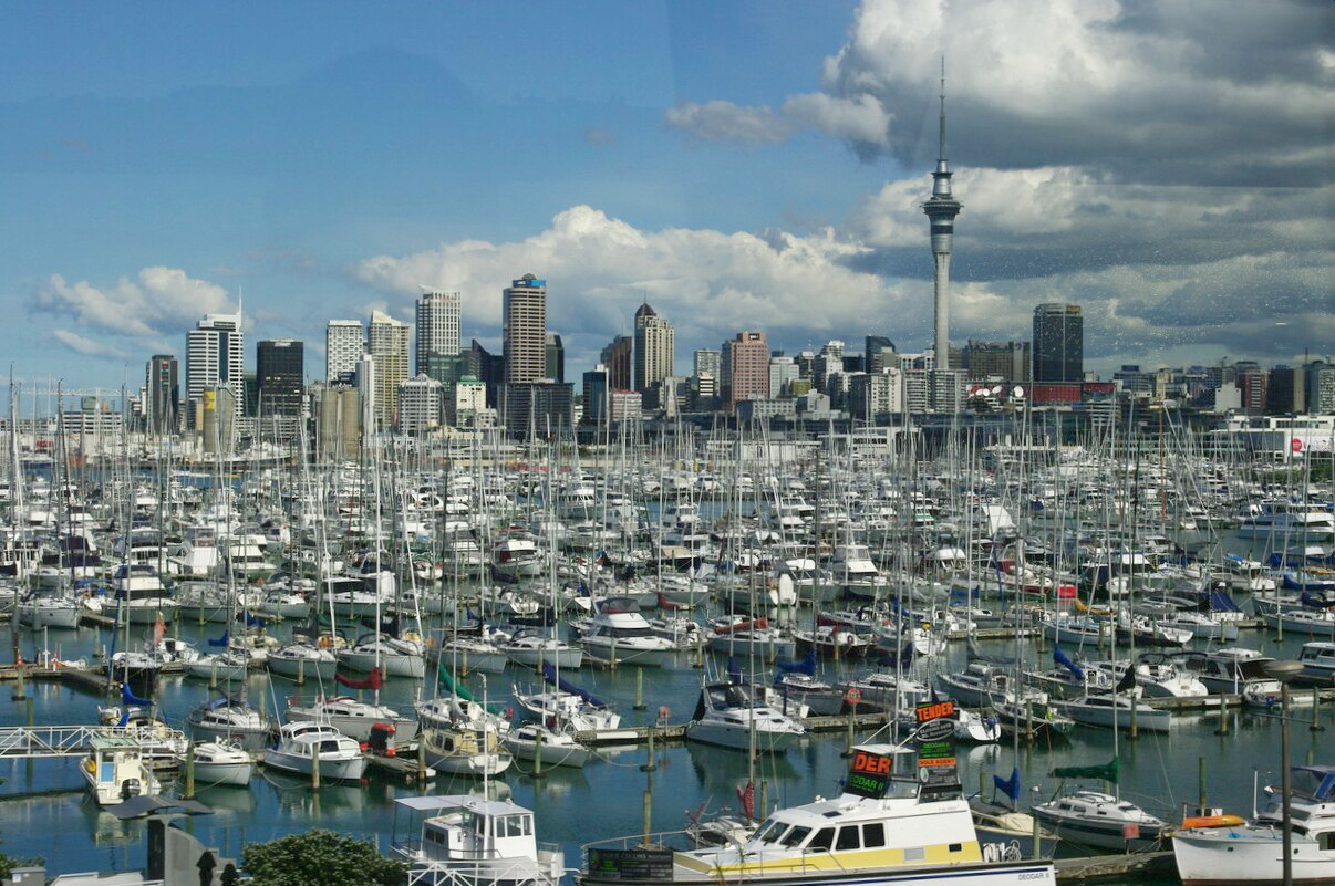 Auckland City of Sails, New Zealand